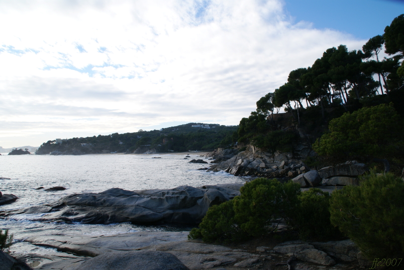 La Costa Brava a Roques Planes (Calonge), Catalunya